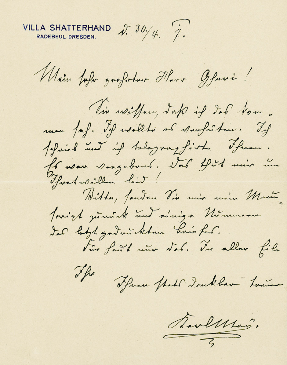 Eigenhändiger Brief von Karl May auf Briefpapier "Villa Shatterhand Radebeul-Dresden" an den österreichischen Schriftsteller Leopold Gheri. Datiert Radebeul 30. April 1907, Poststempel: Radebeul 1. Mai 1907. Mein sehr geehrter Her Gheri! Sie wissen, dass ich das kommen sah. Ich wollte es verhüten. Ich schrieb und ich telegraphierte Ihnen. Es war vergebens. Das thut mir um Ihretwillen leid! Bitte, senden Sie mir mein Manuscript zurück und einige Nummern des letztgedruckten Briefes. Für heut nur das. In aller Eile Ihr Ihnen stets dankbar treuer Karl May".